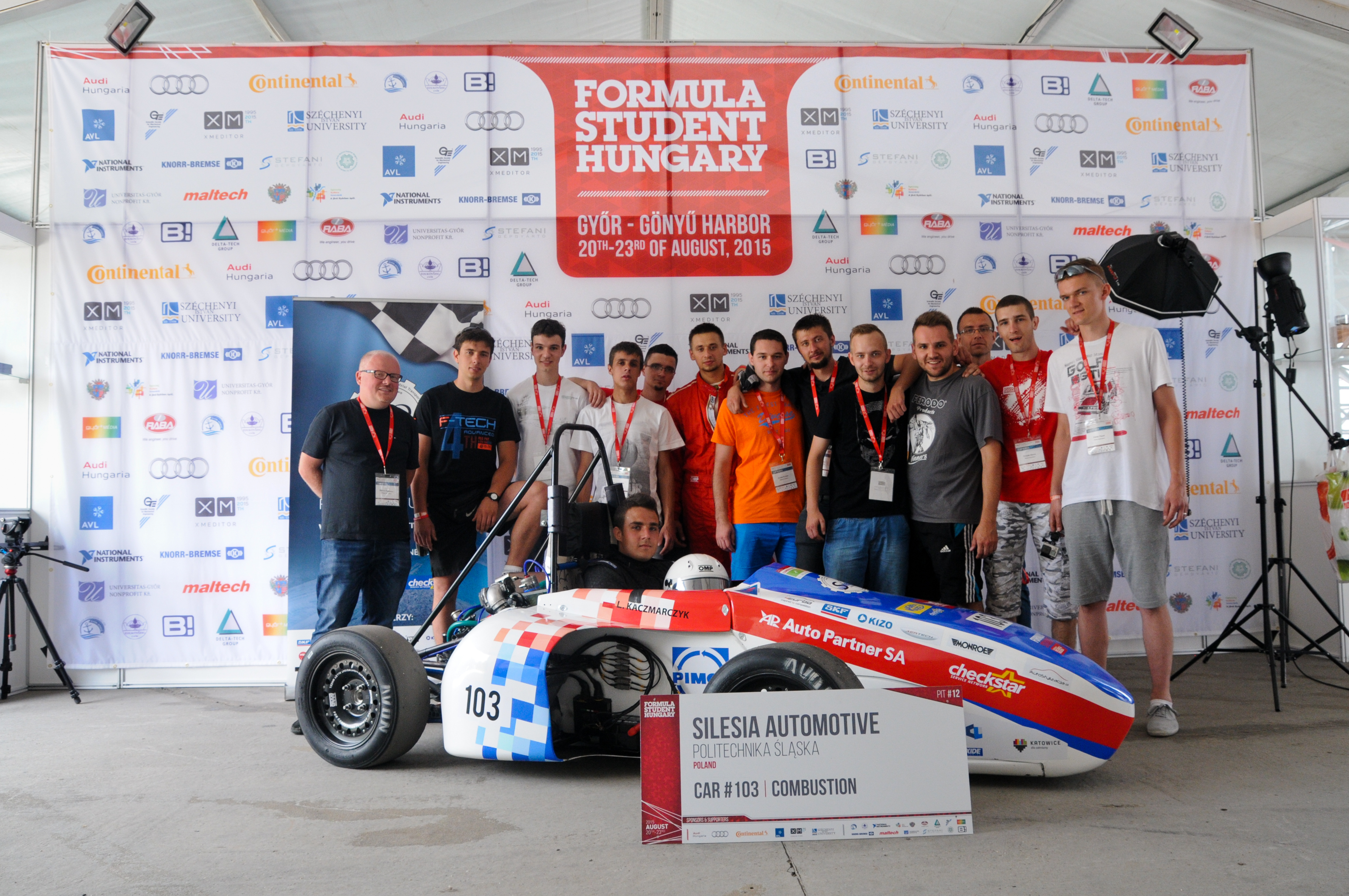 Zespół Silesia Automotive podczas zawodów Formula Student Hungary, 2015 rok